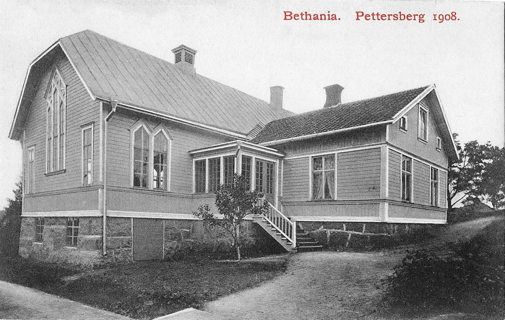 Hotellet Bethania i Stensholm, Hakarp.